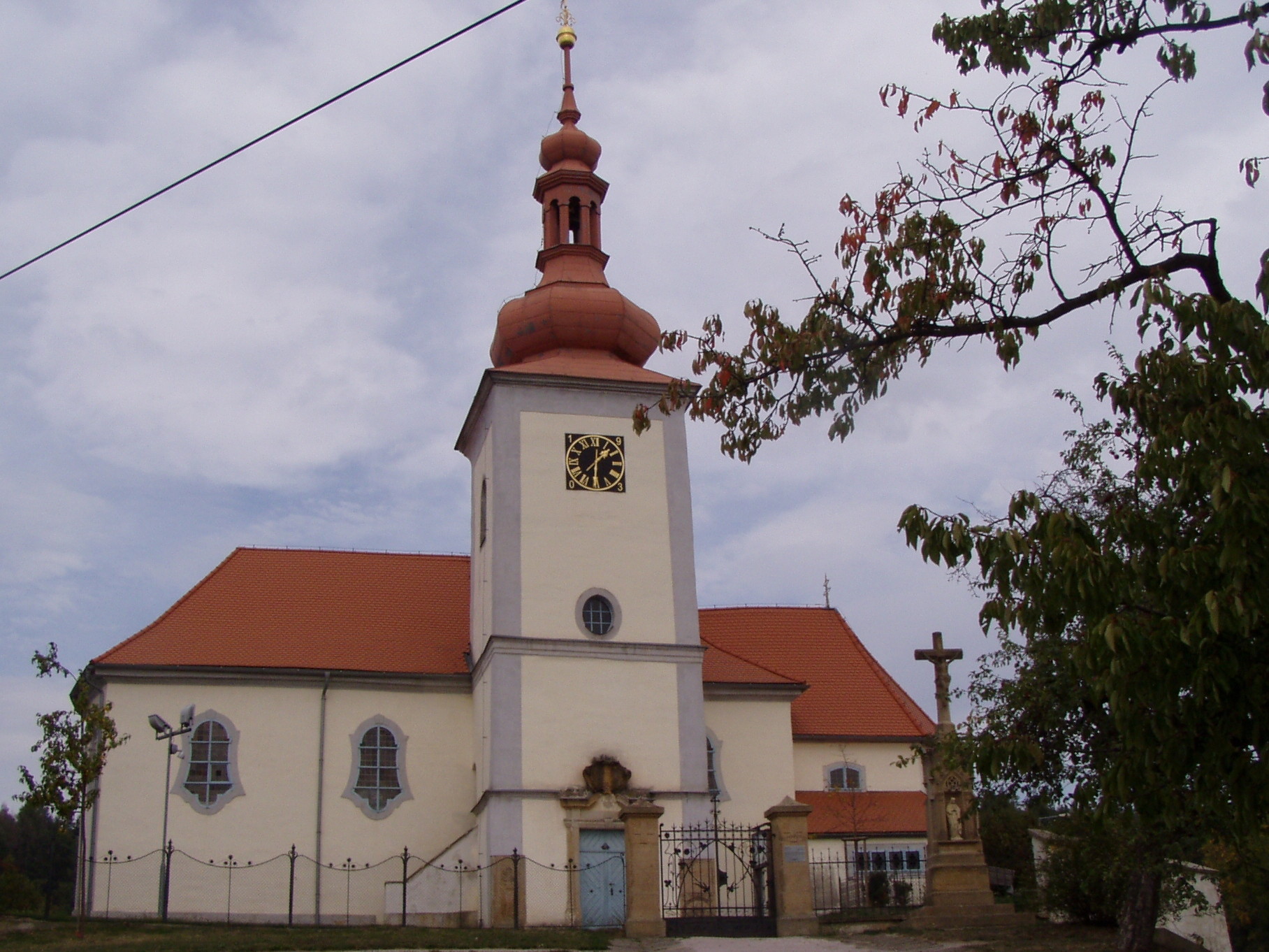 Kostel sv. Bartoloměje (Chodovice)